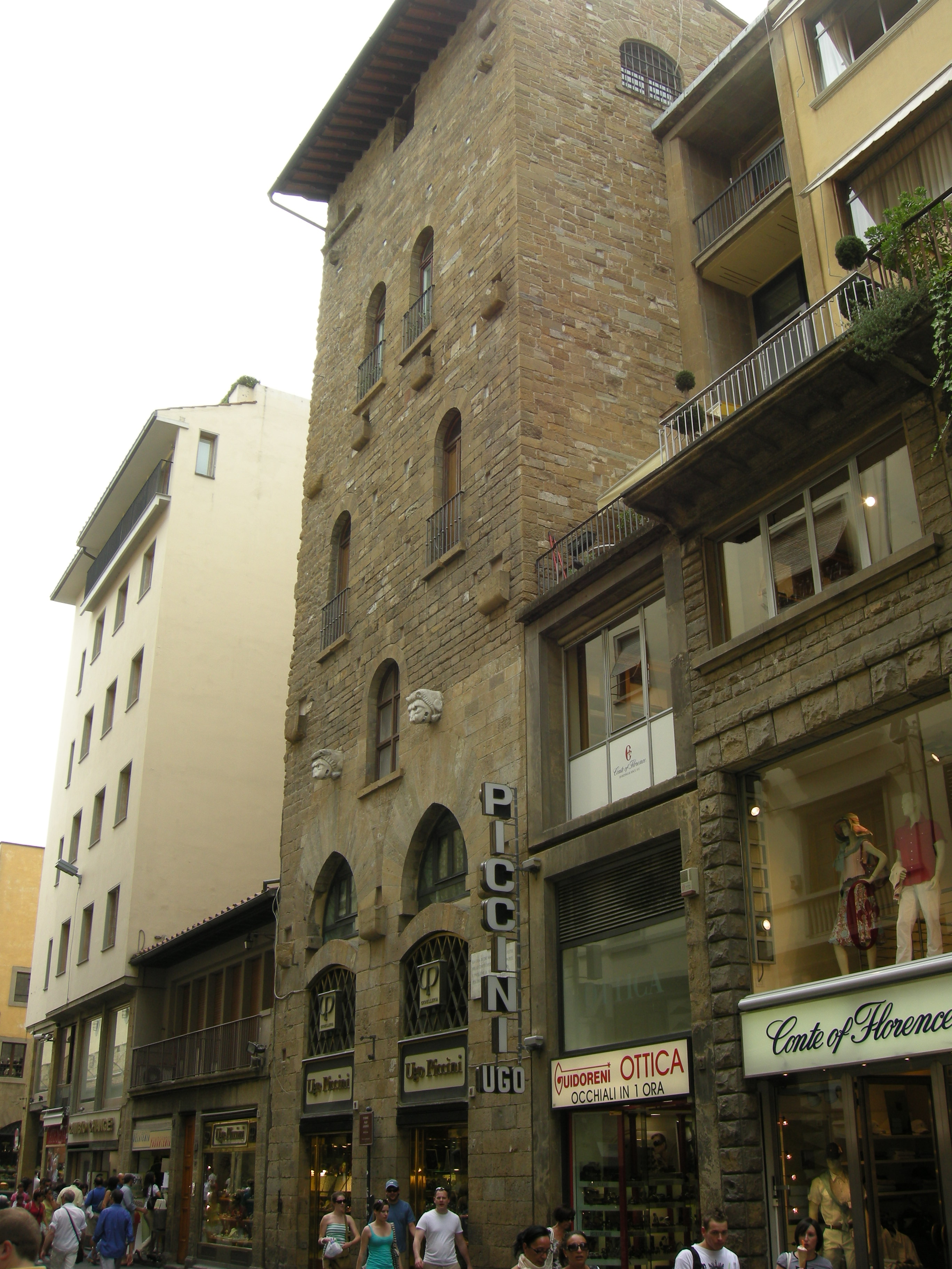 Torre degli amidei